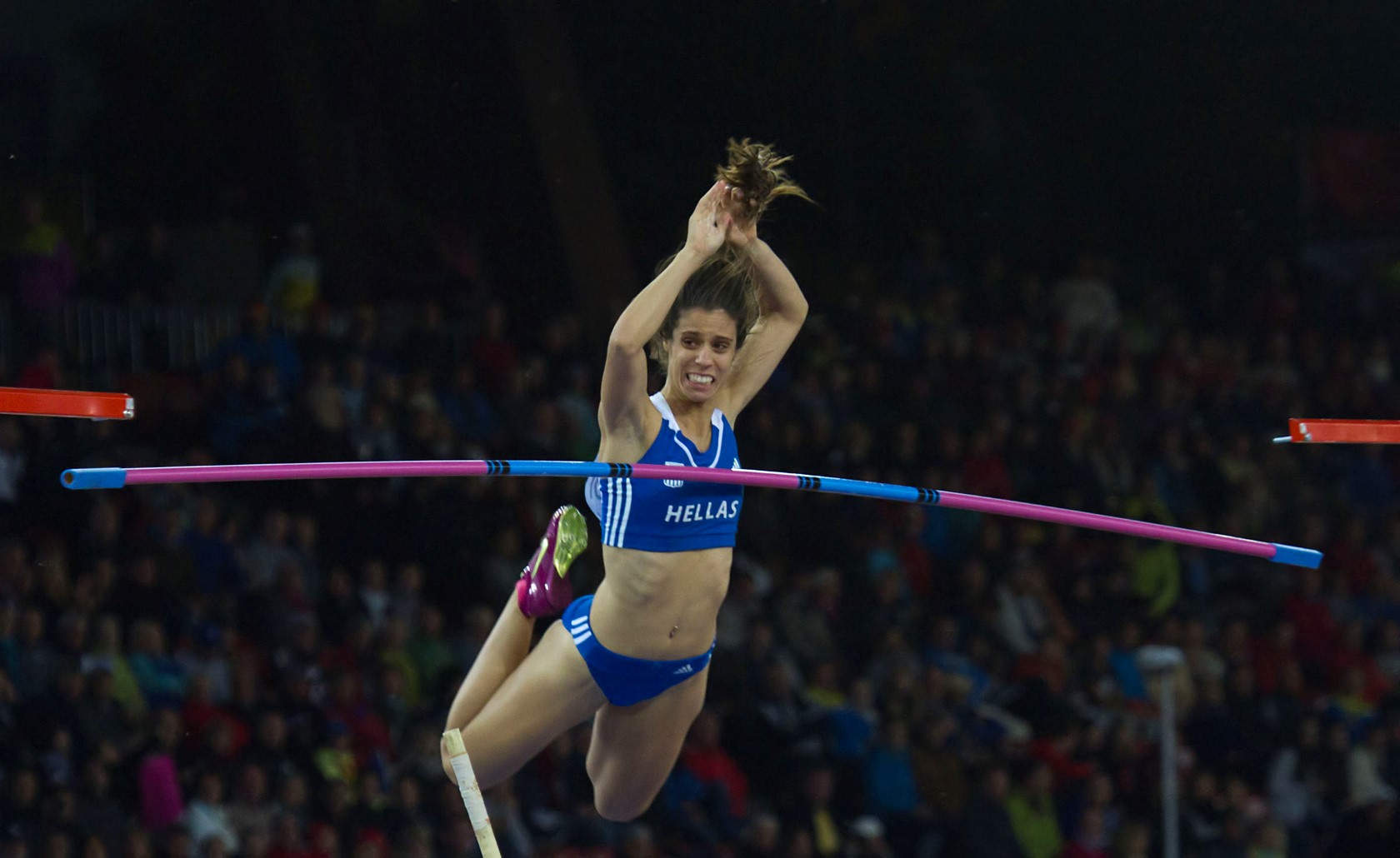 9064 stefanidi